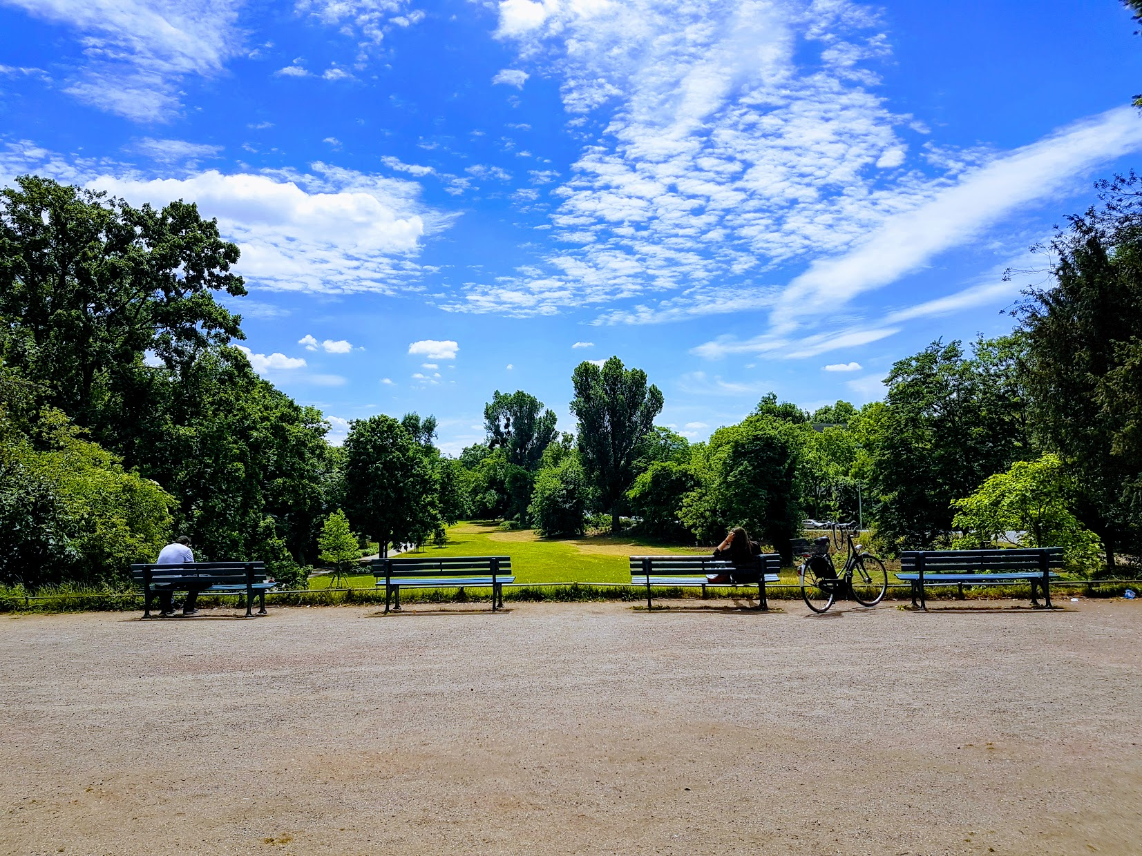 Hofgarten Aussichtspunkt vom Napoleonsberg